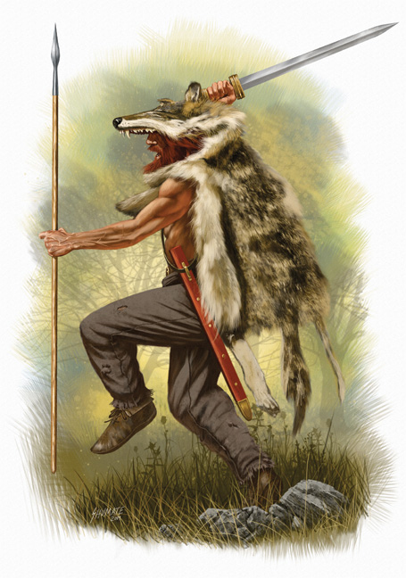 um guerreiro de uma classe guerreiros nórdicos chamada ulfhednar